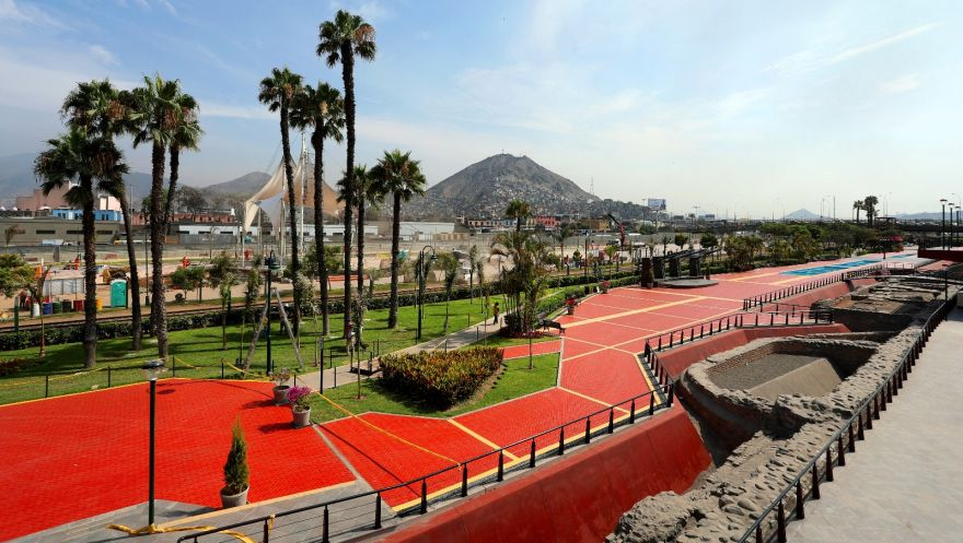 Parque de la Muralla, Centro de Lima